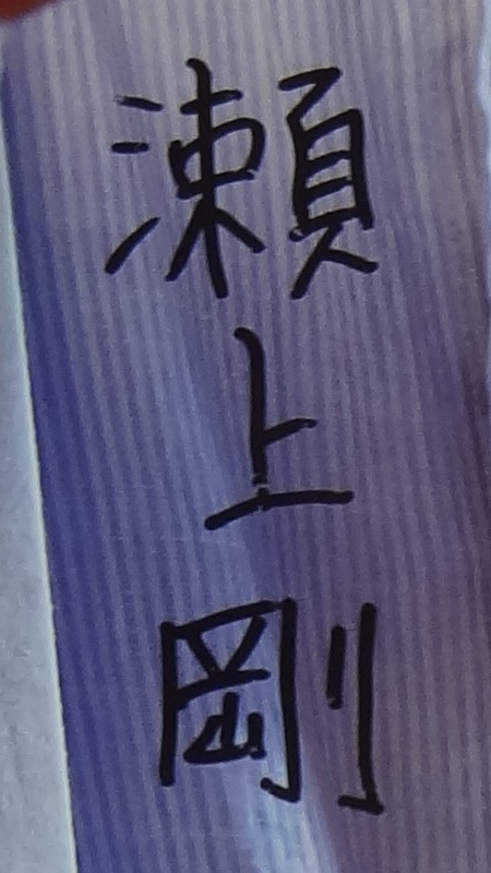 JET日本台節目《瀨上剛in台灣》主持人瀨上剛的簽名。